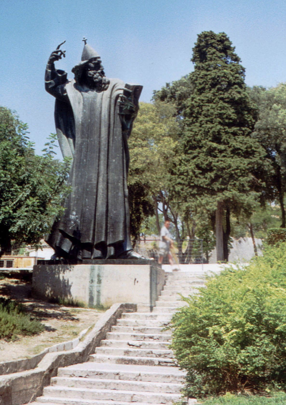 Estatua "Gregorio de Nin" en Split, Croacia, obra de Ivan Mestrovic en 1929.